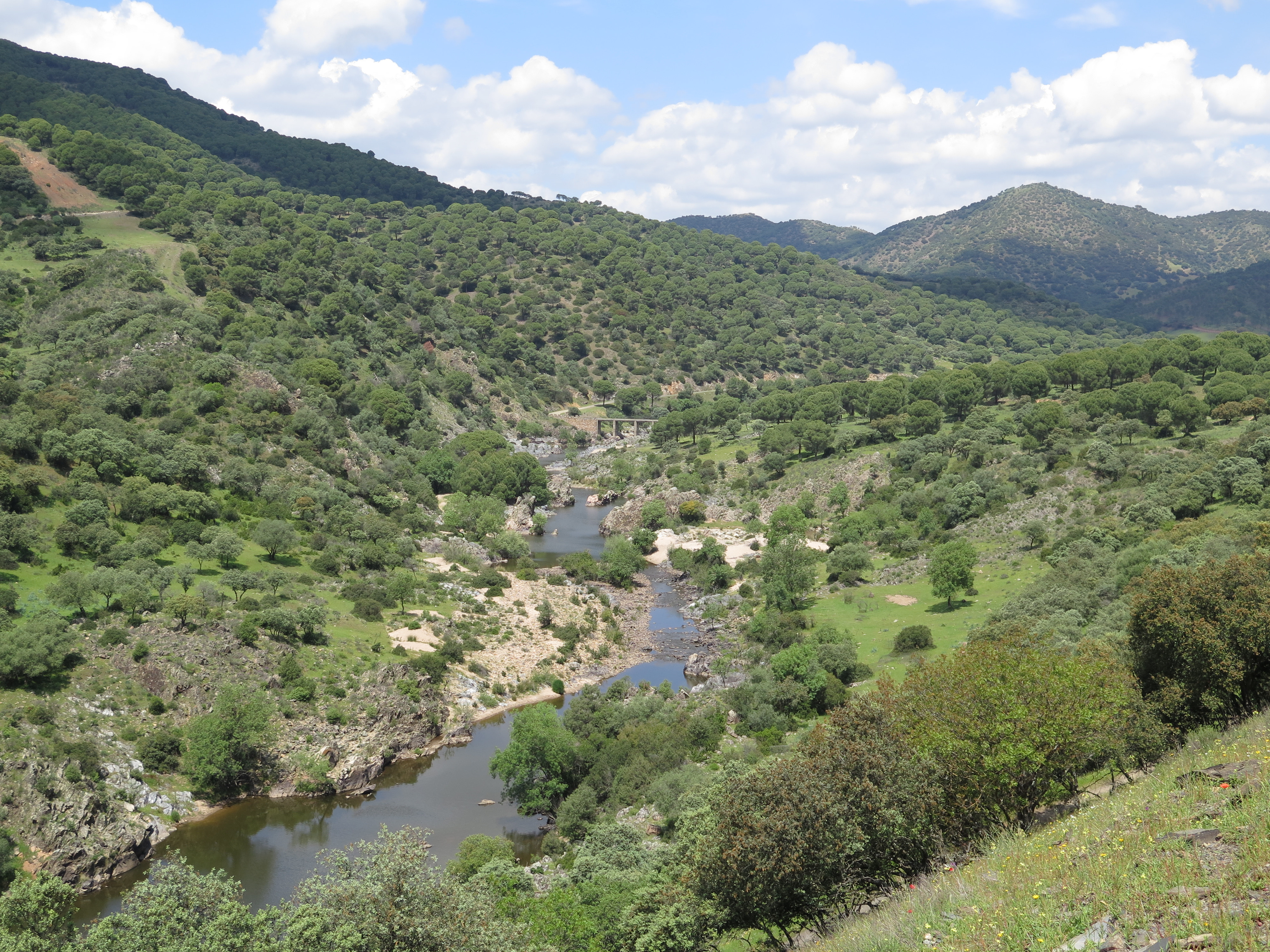 Río Jándula por mitad del Parque Natural de la Sierra de Andújar..